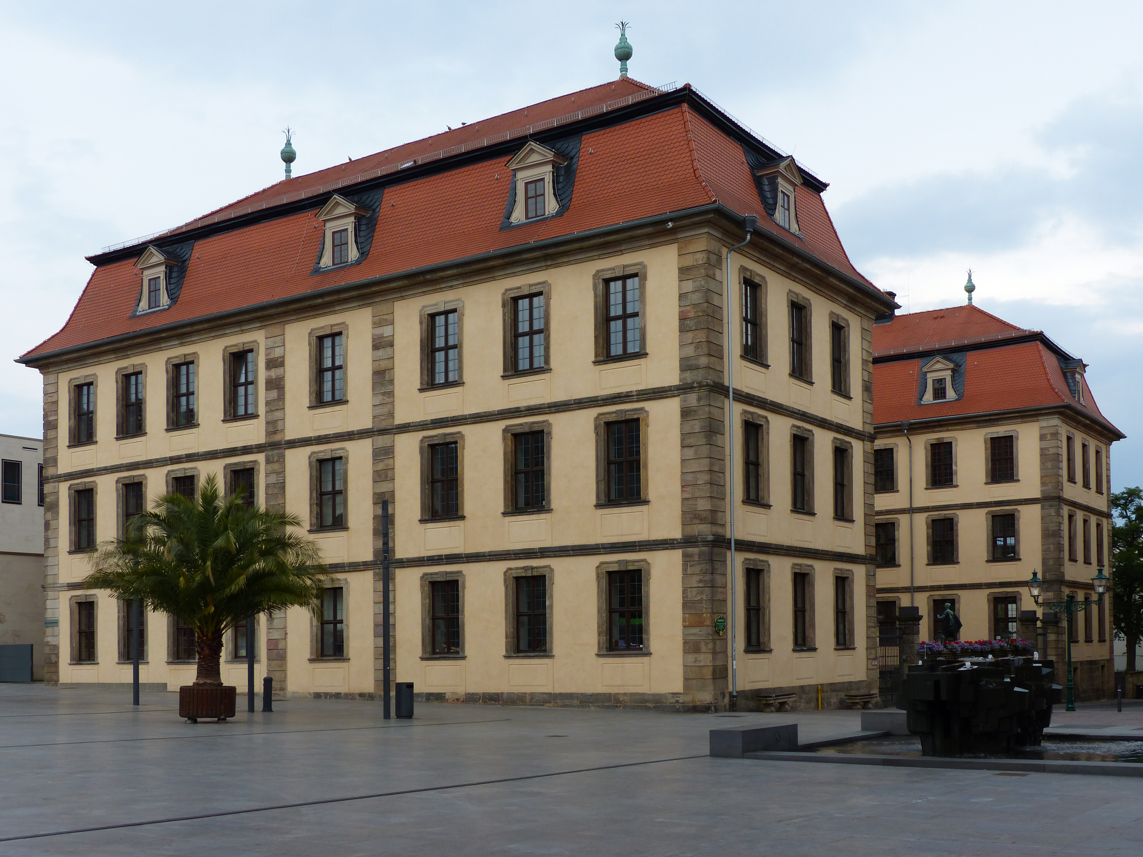 Alte Universität, Universitätsstraße 1, Fulda